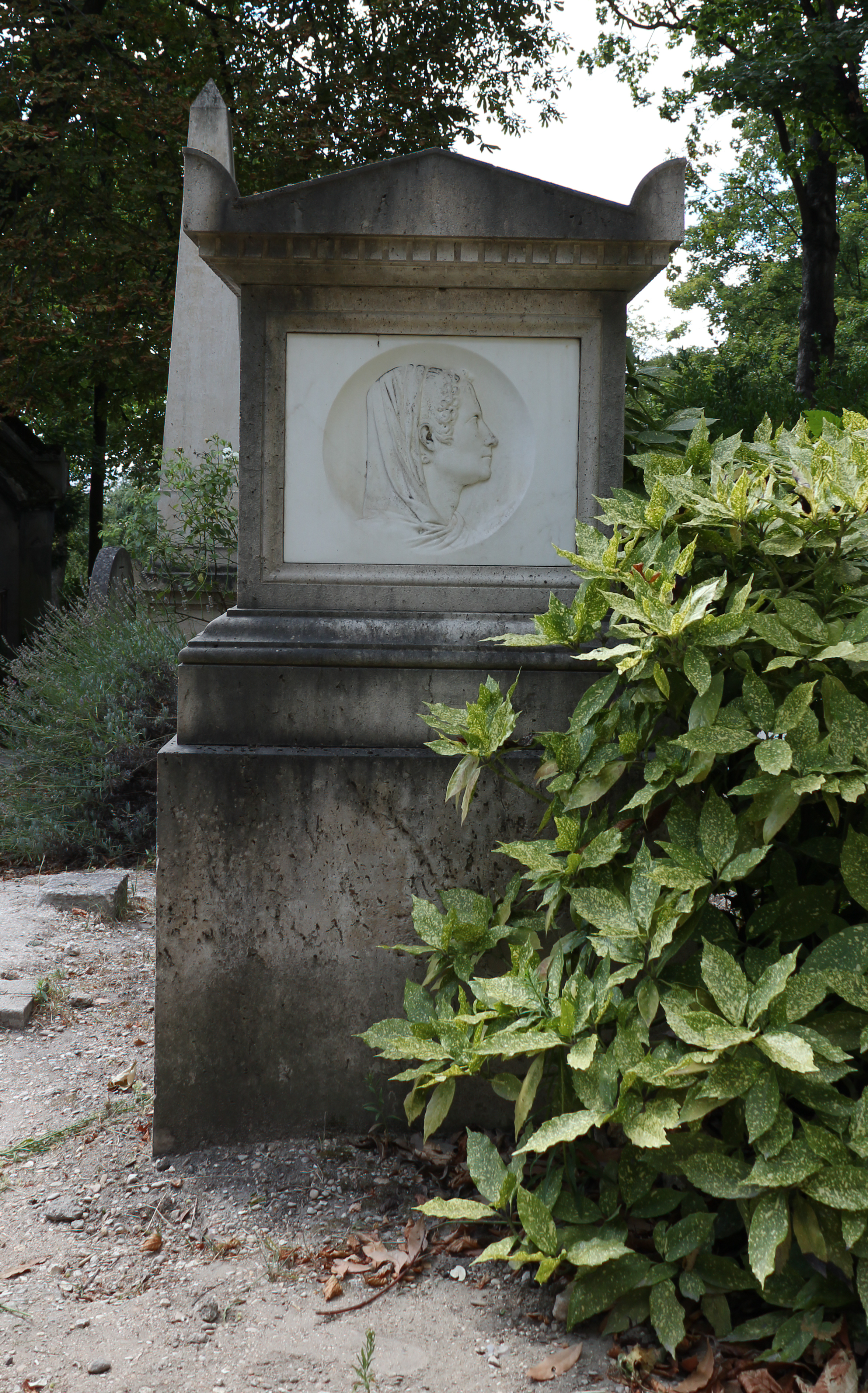 Sépulture de la femme de lettres Félicité de Genlis (1746-1830). Monument rectangulaire décoré d'un médaillon en marbre de Sornet. Le monument était à l'origine surmonté d'une urne funéraire.